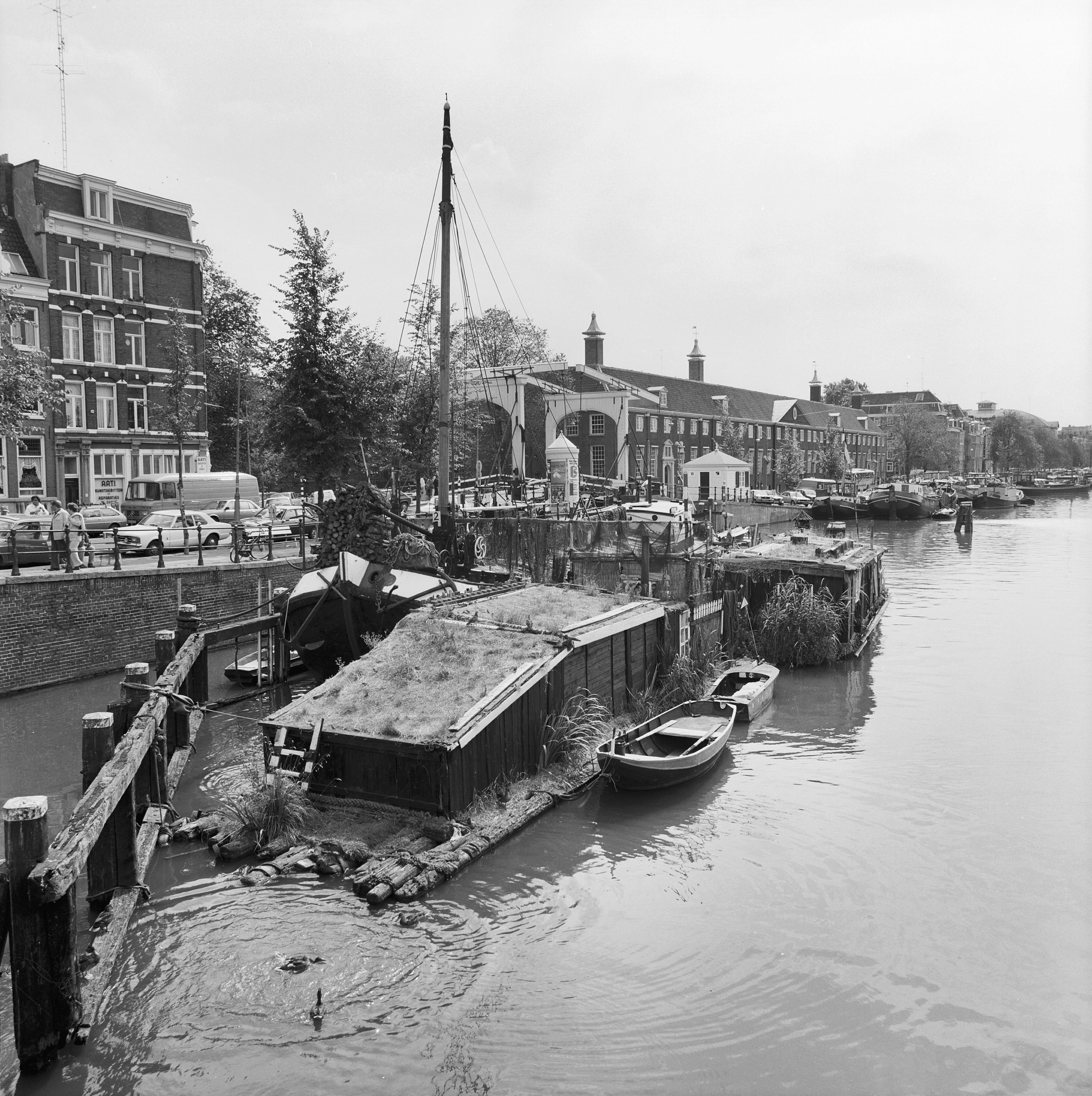 Bruggen: De Amstel gezien vanaf de Blauwbrug